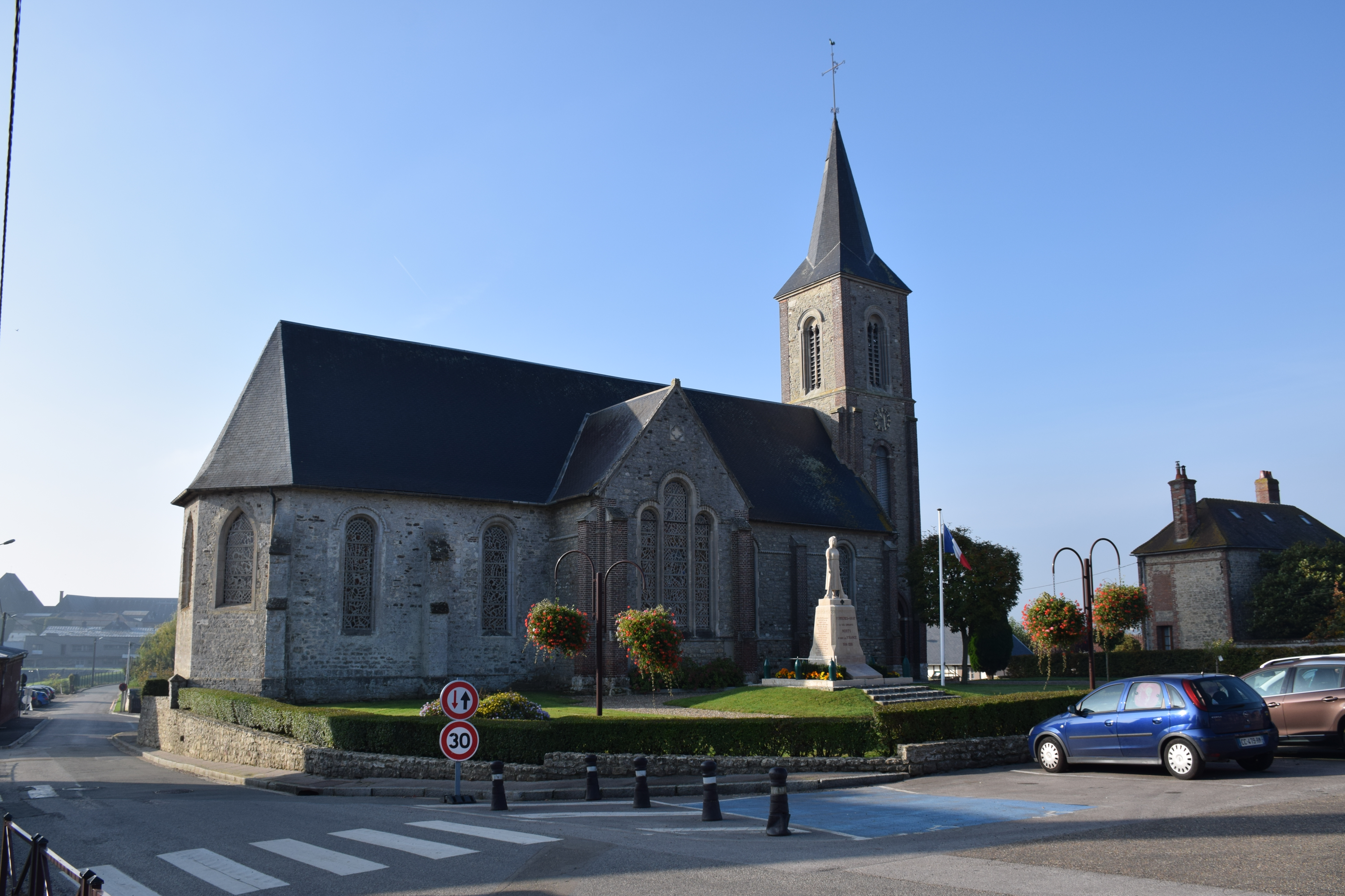 Eglise